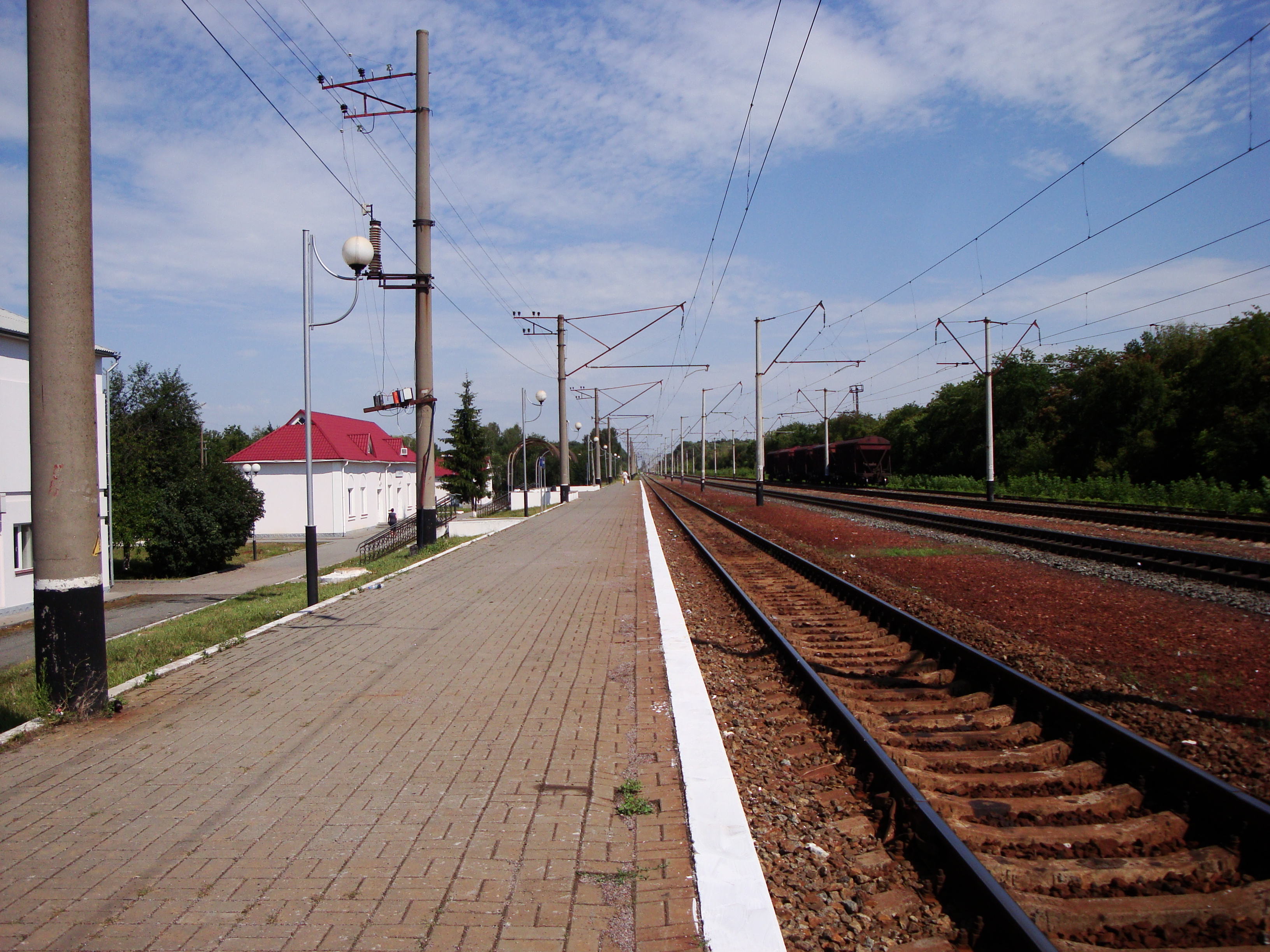 Станція Кагарлик Південно-Західної залізниці